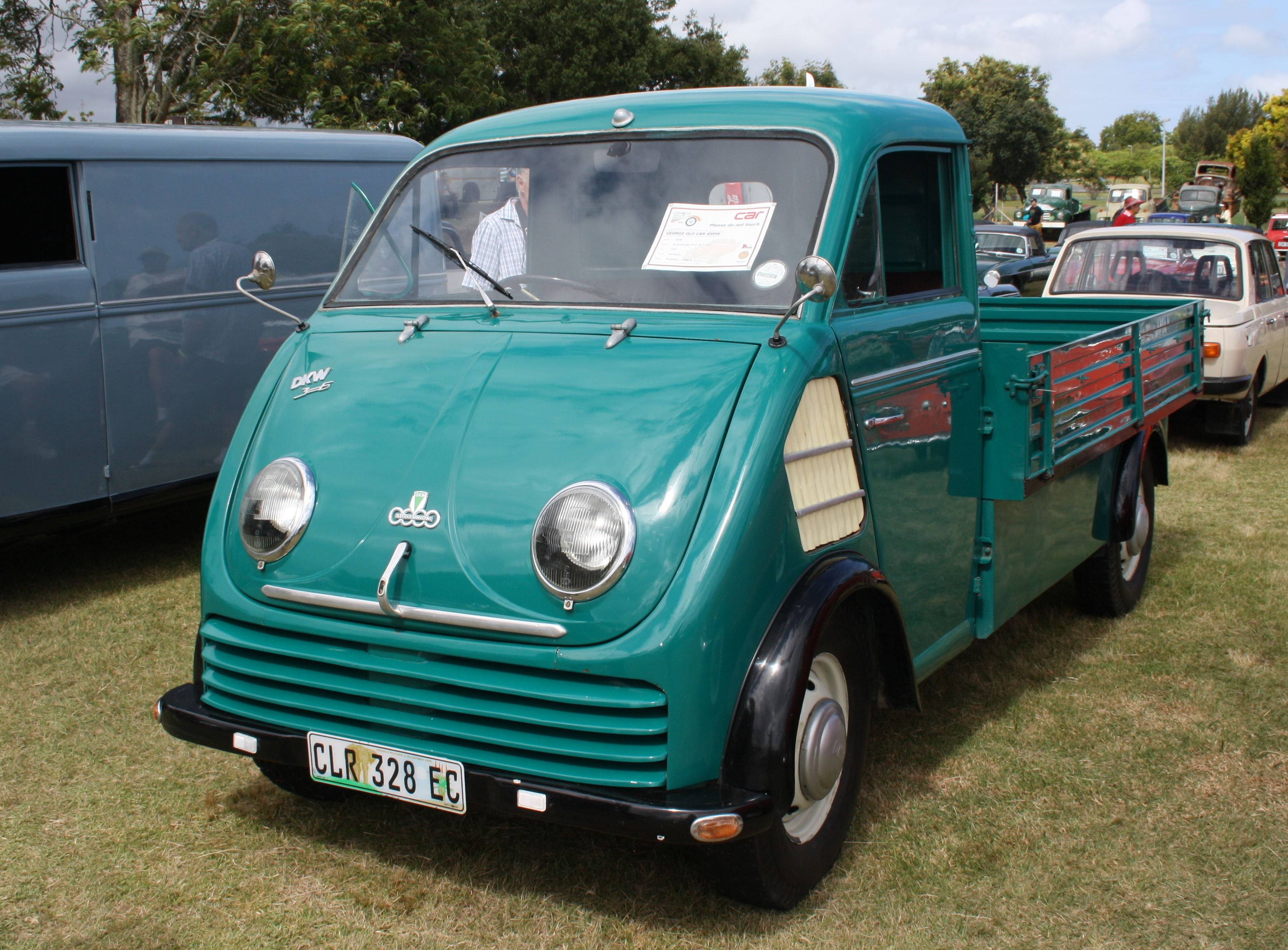 1957 DKW Schnellaster pickup